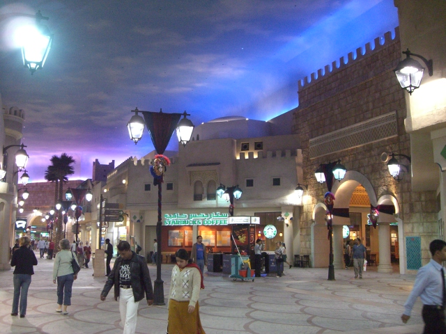 Dubai